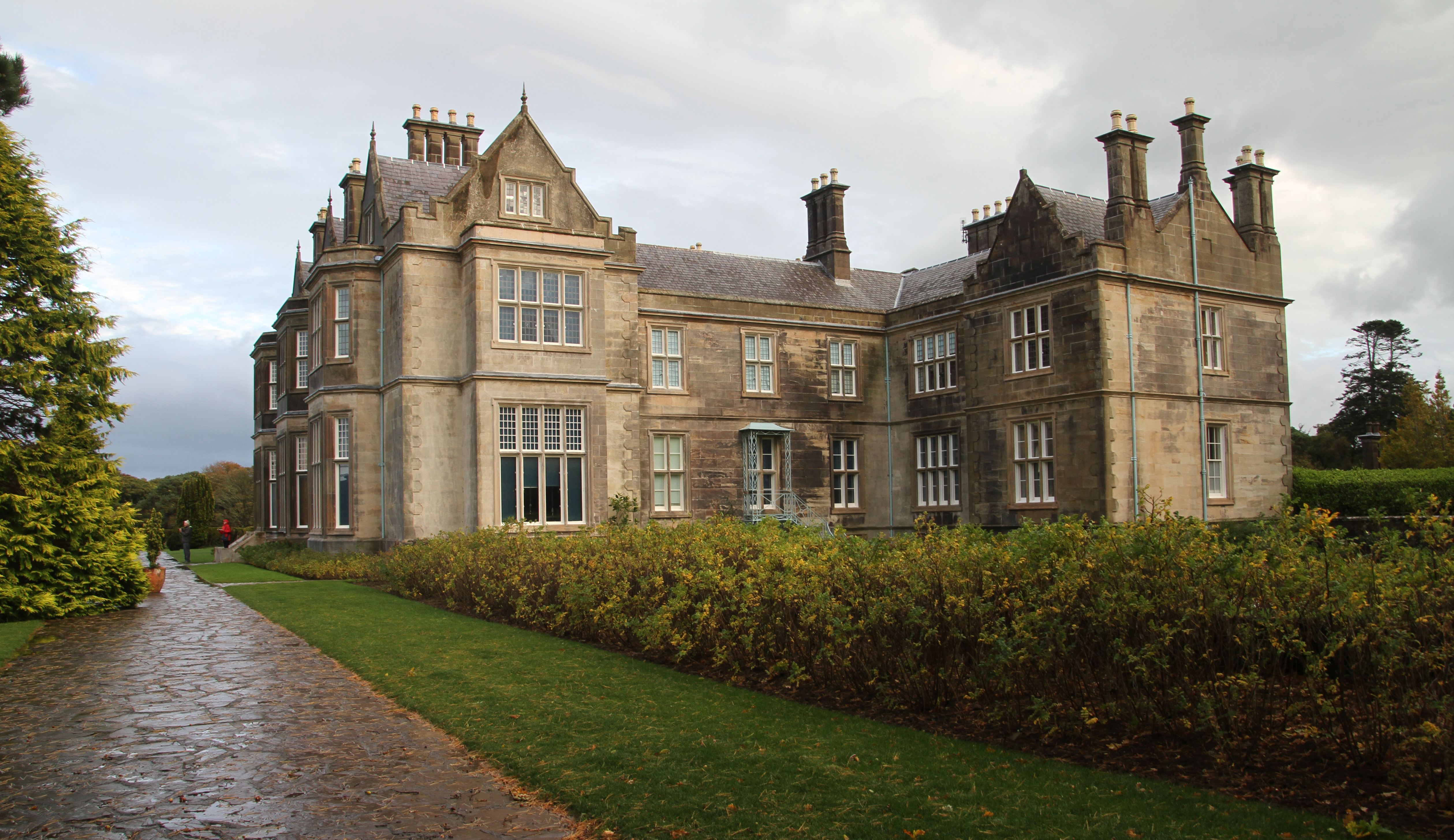 Muckross House